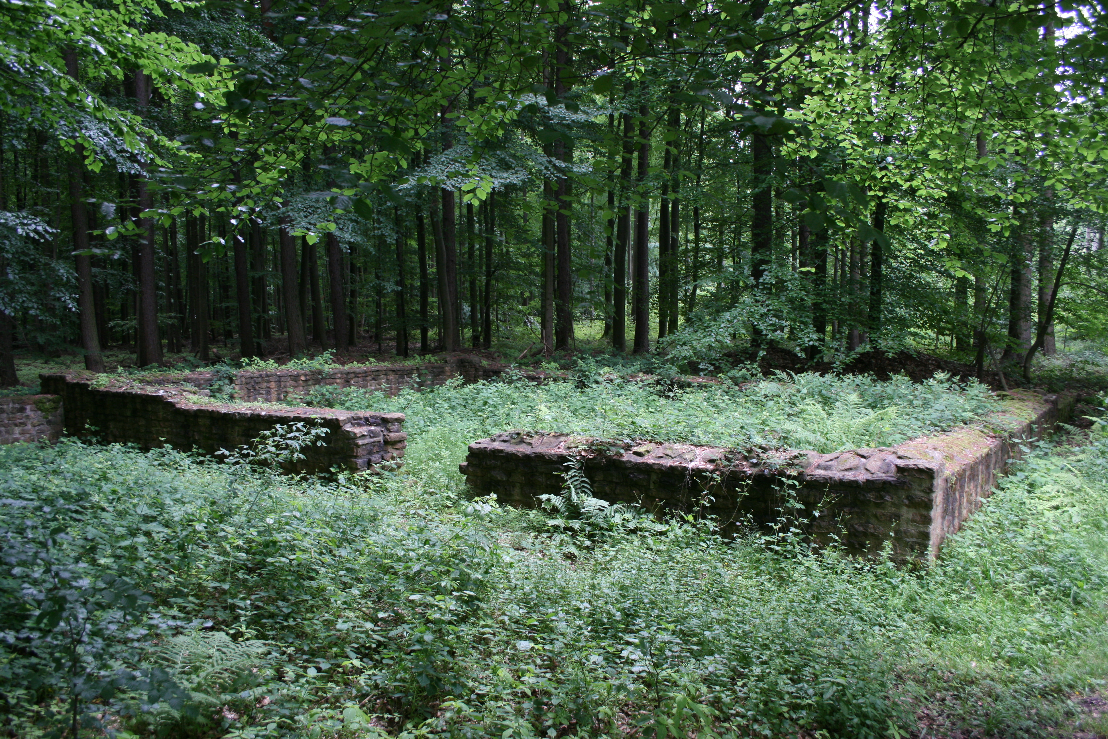 Wamboltsches Schlösschen, römischer Siedlungsplatz bei Groß-Umstadt-Heubach, Ansicht der konservierten Grundmauern von Gebäude I.